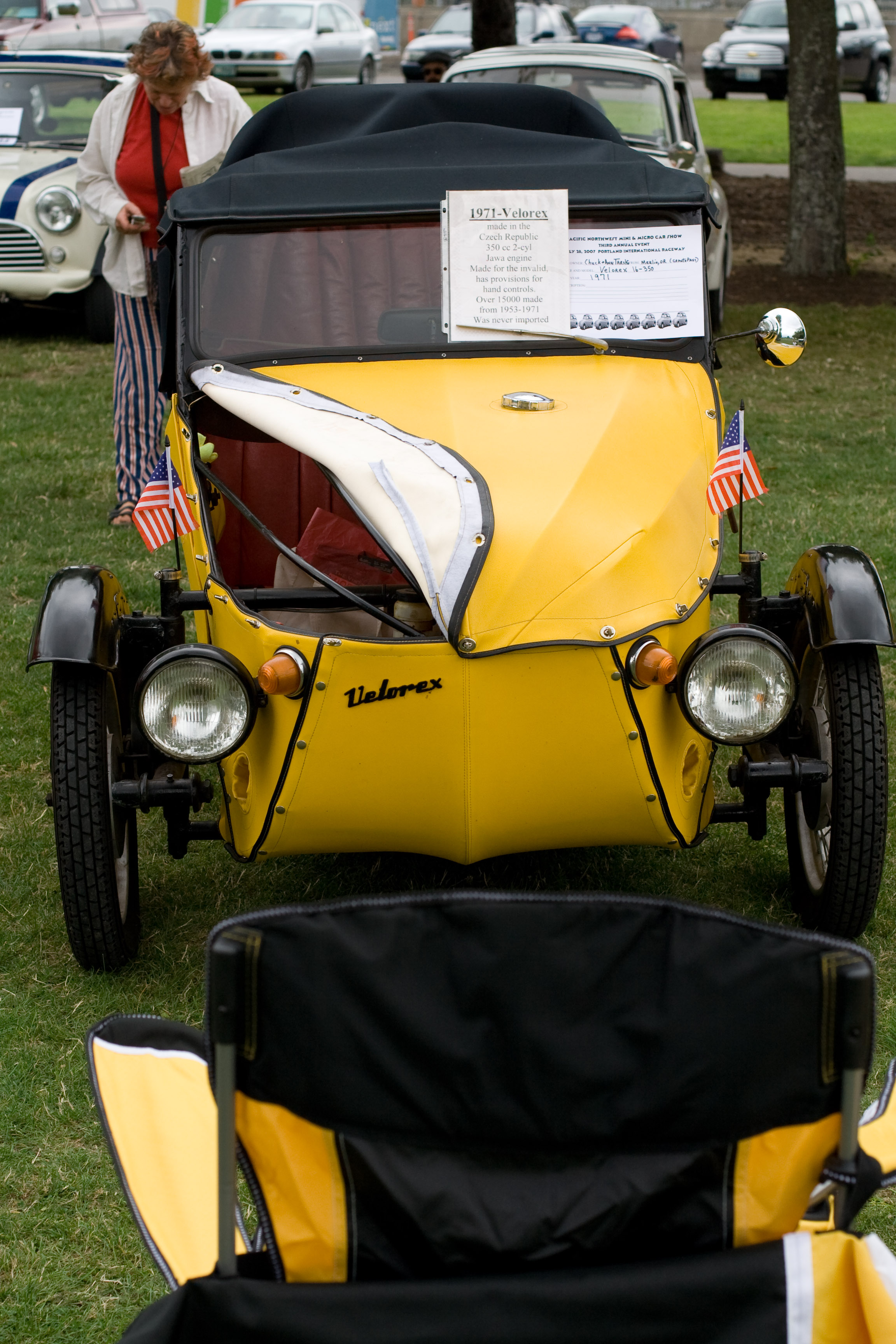 1971 Velorex20070728_MG_7929.jpg